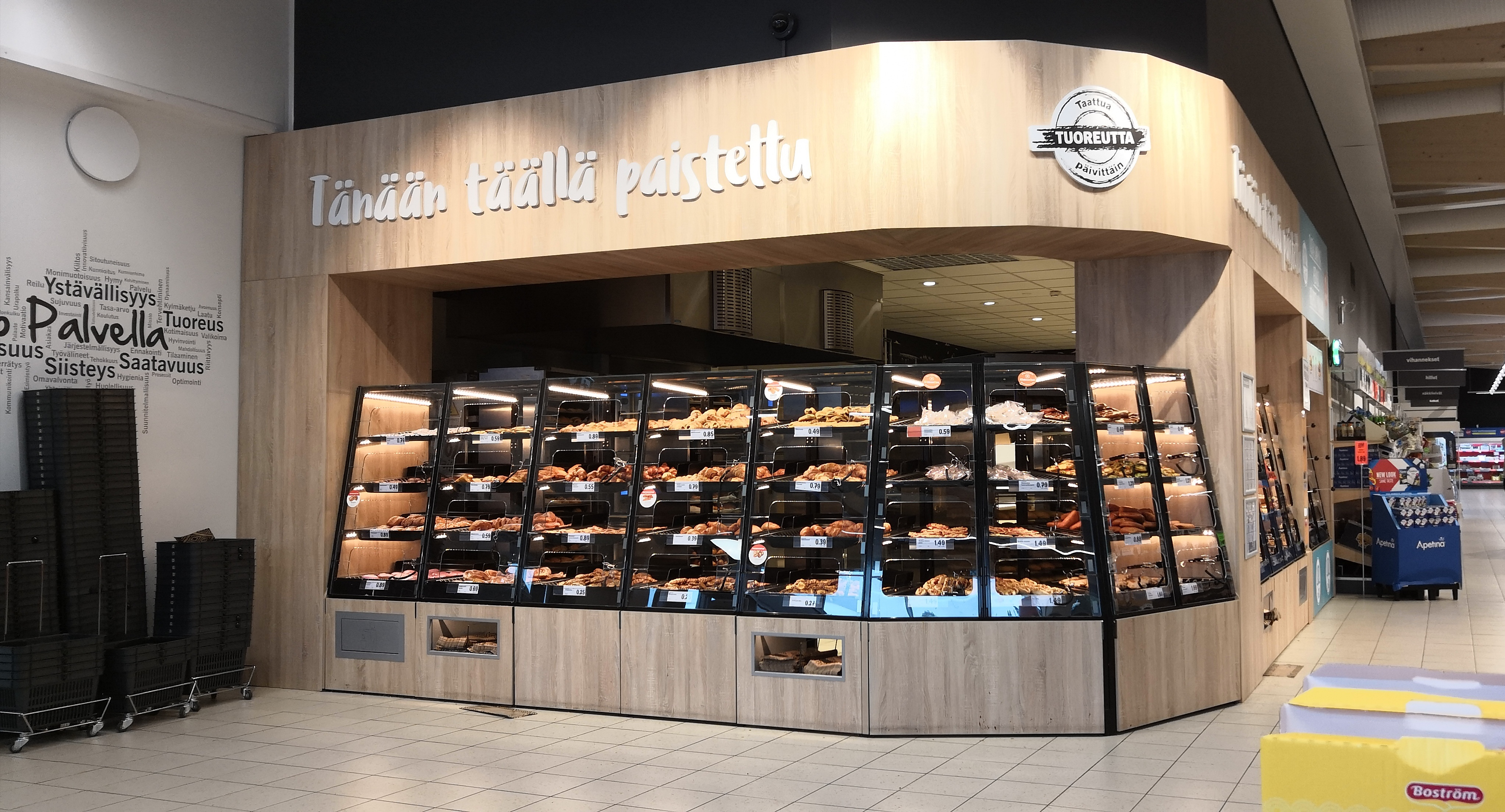 LIDL-myymälän paistopiste Kouvolan Tornionmäessä